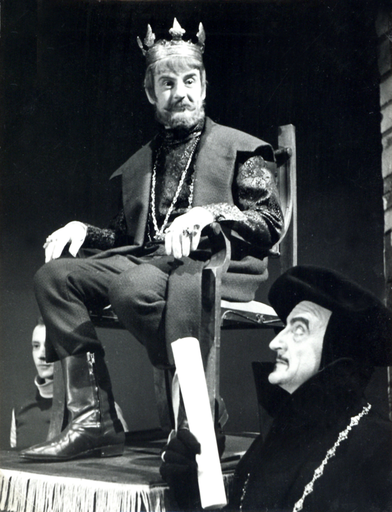 Friedrich Dürrenmatt, Prekrščevalci, Mestno gledališče ljubljansko. Na fotografiji: Zlatko Šugman (Cesar Karel V.), Franjo Kumer (Kancler).